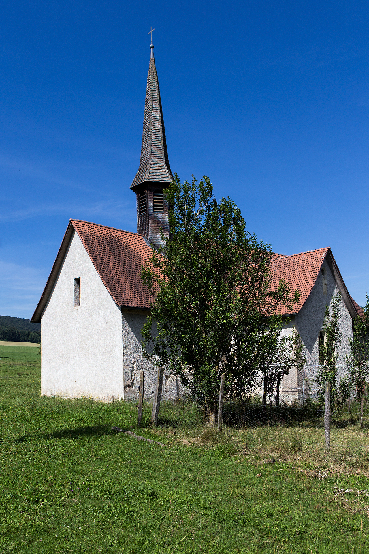 Kapelle Sainte-Croix zwischen Fontenais und Villars (JU)